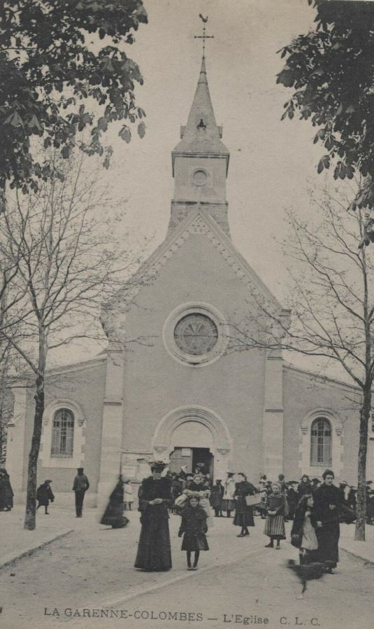 La Garenne-Colombes.Eglise